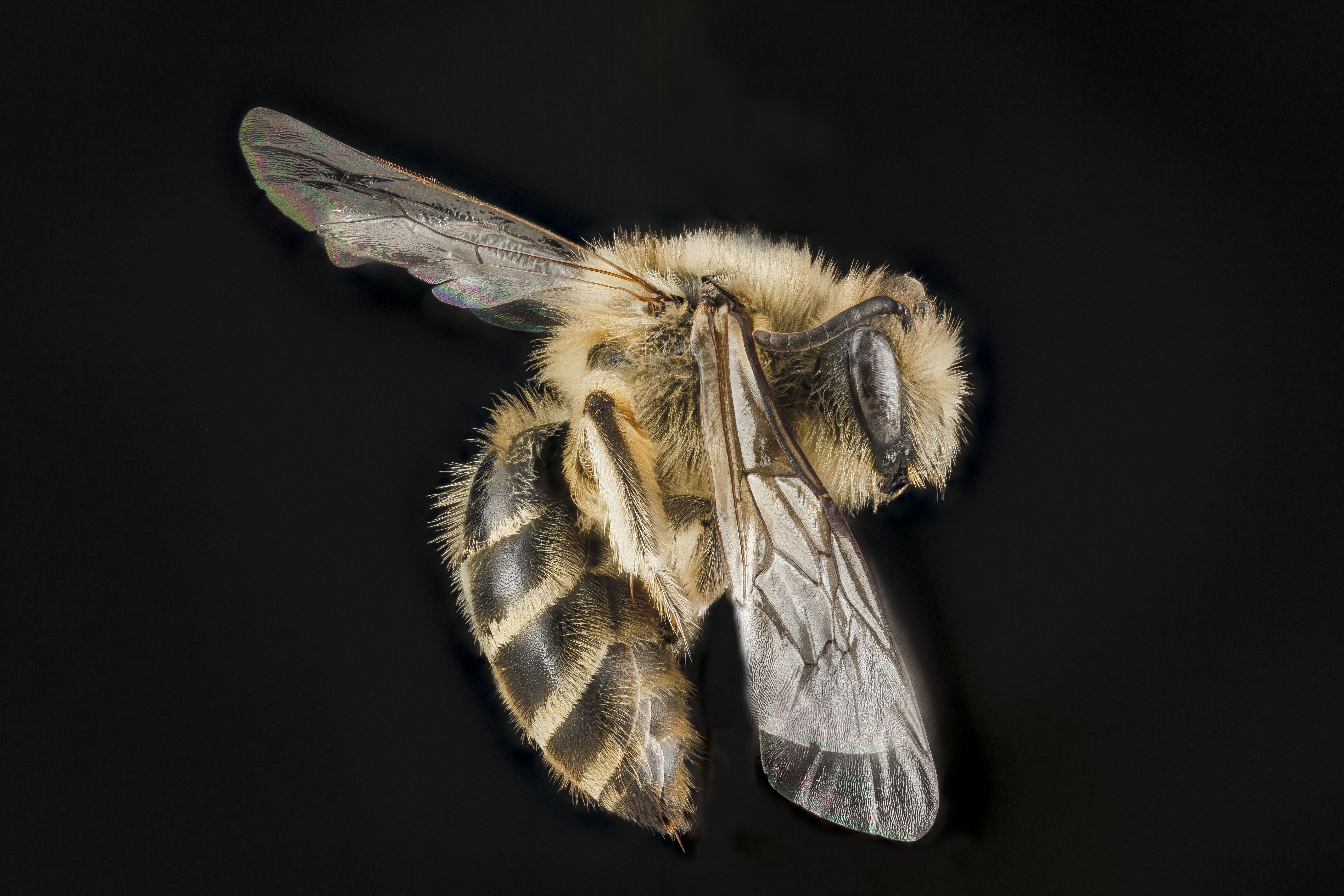 Colletes inaequalis, female